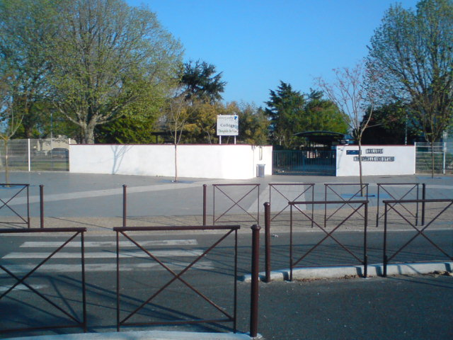 Collège Théophile de Viau au Passage d'Agen (47)